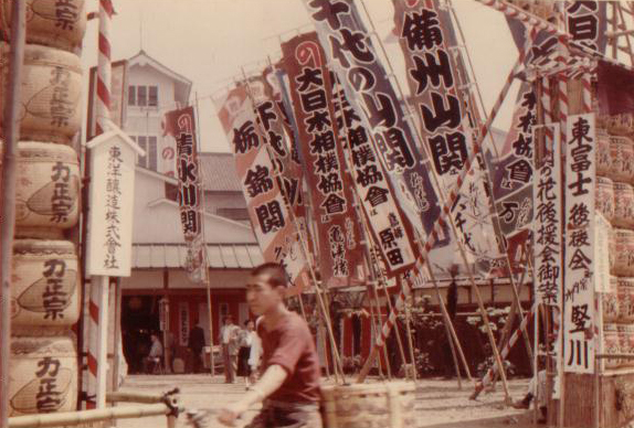 旧蔵前国技館正門 Kuramae Kokugikan main entrance